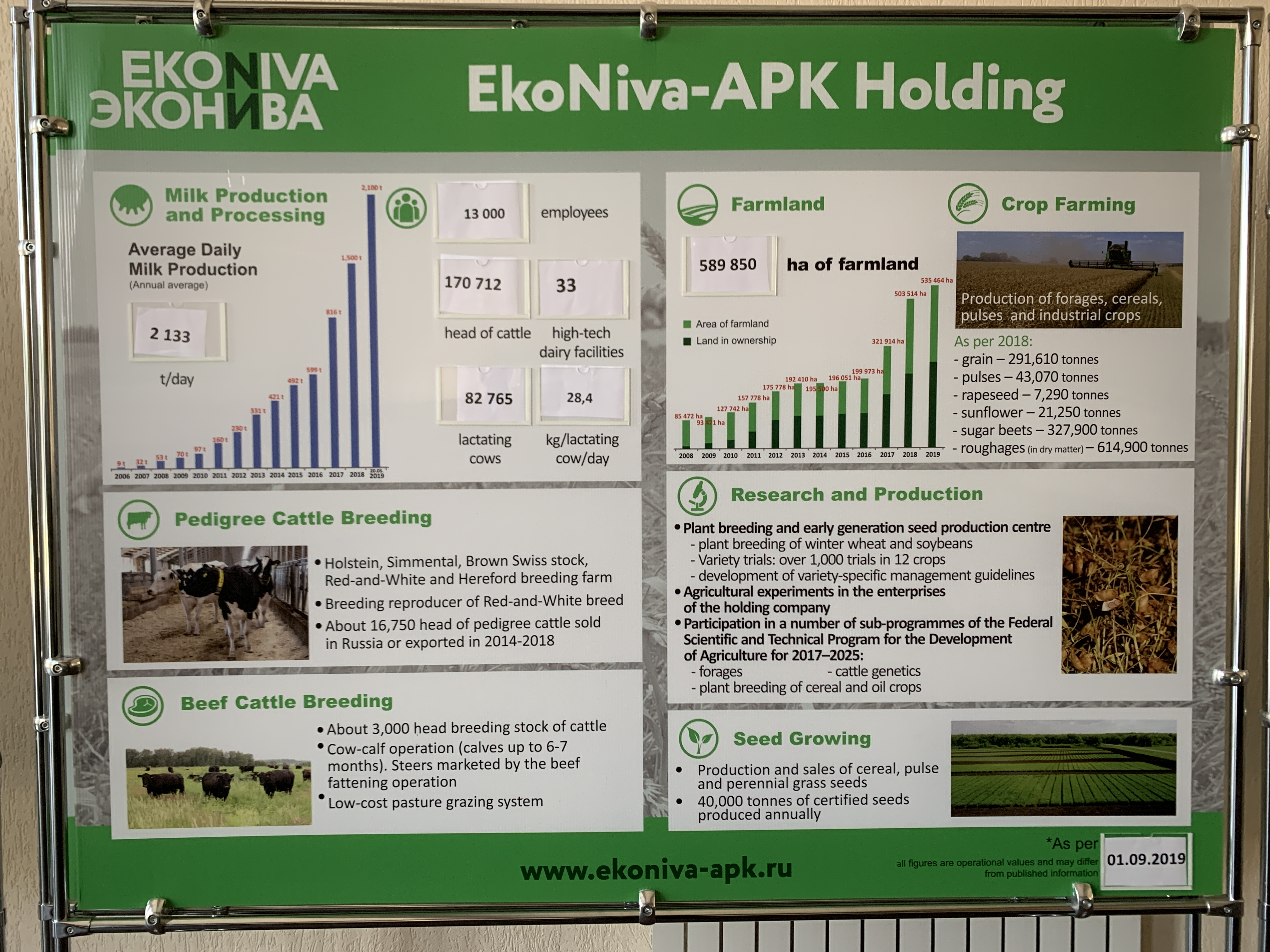 Posterpräsentation der EkoNiva-APK Holding in Russland